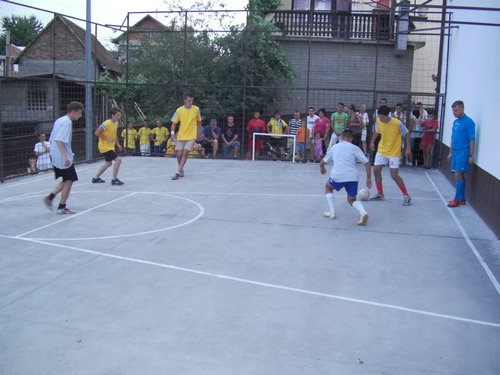 Turnir u malom fudbalu